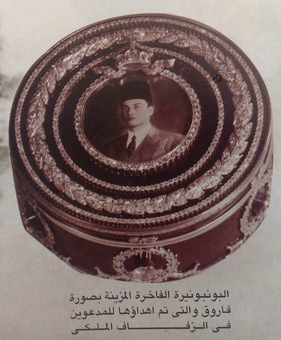 بونبونيرة حفل زواج الملك فاروق من الملكة فريدة التي توزع على المدعويين